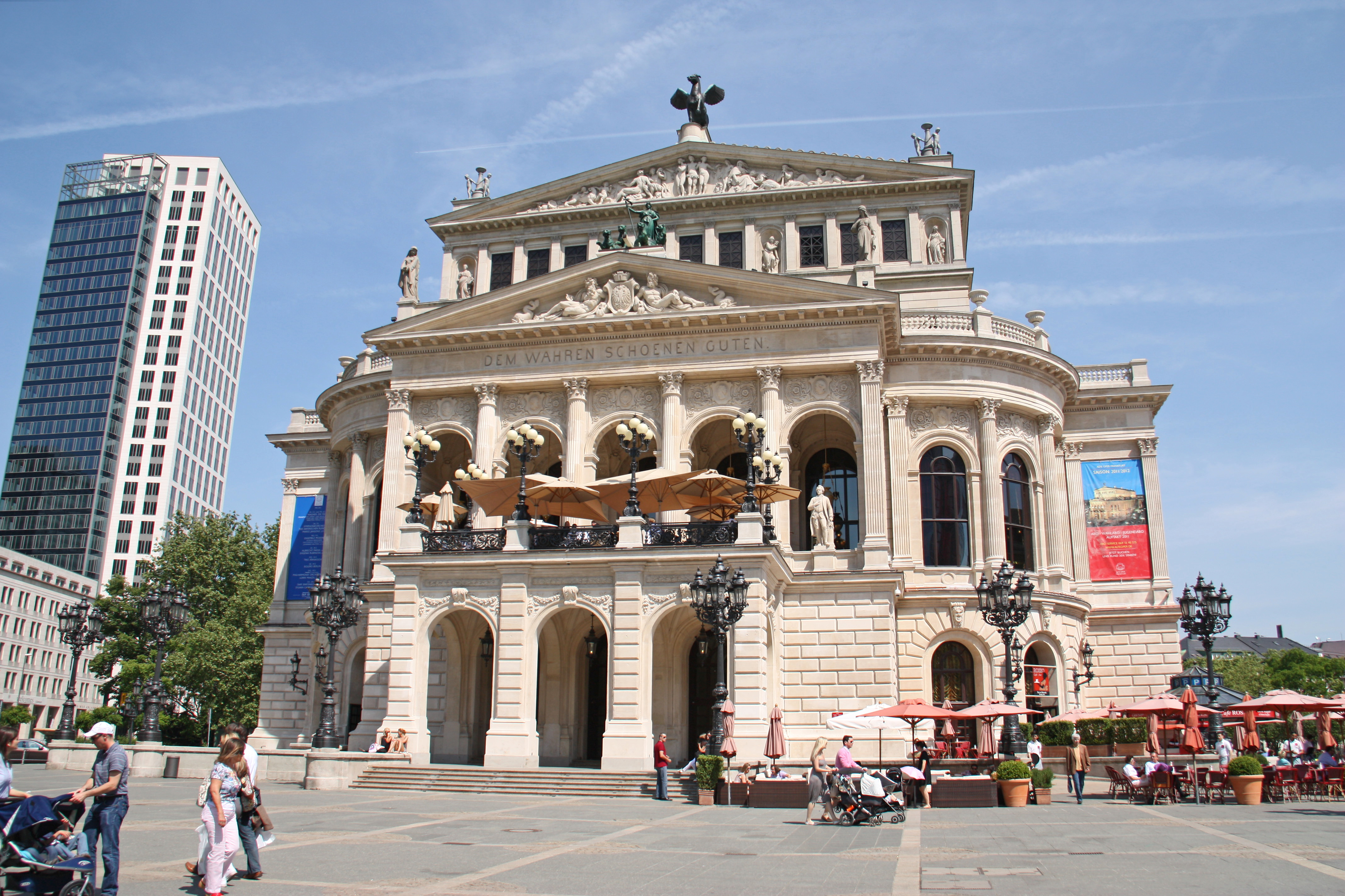 Die Alte Oper wurde 1880 fertiggestellt, jedoch im 1944 im Luftangriff auf Frankfurt größtenteils zerstört, die Frankfurter Oper zog daraufhin nach dem Krieg in das neu errichtete Schauspielhaus am heutigen Willy-Brandt-Platz um, die Opernruine prägte hingegen noch über 30 Jahre lang das Frankfurter Stadtbild. In den 1960er Jahren sollten die Überreste des Opernhauses gesprengt und durch ein modernes Bürogebäude ersetzt werden, was jedoch durch den langjährigen Einsatz einer Bürgerinitiative verhindert werden konnte - nichtdestotrotz wurde die Alte Oper erst 1981 als Konzert- und Veranstaltungsgebäude rekonstruiert.